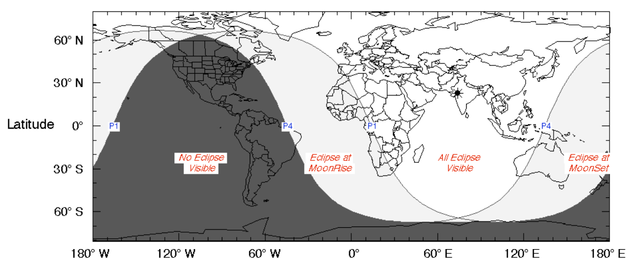 Visibilidad Eclipse Enero 10 de 2020